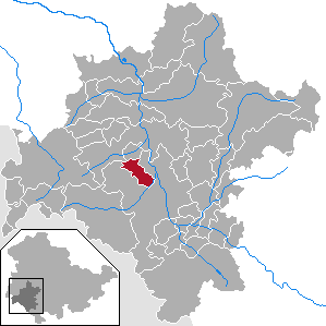 Rippershausen in Thuringia - District Schmalkalden-Meiningen